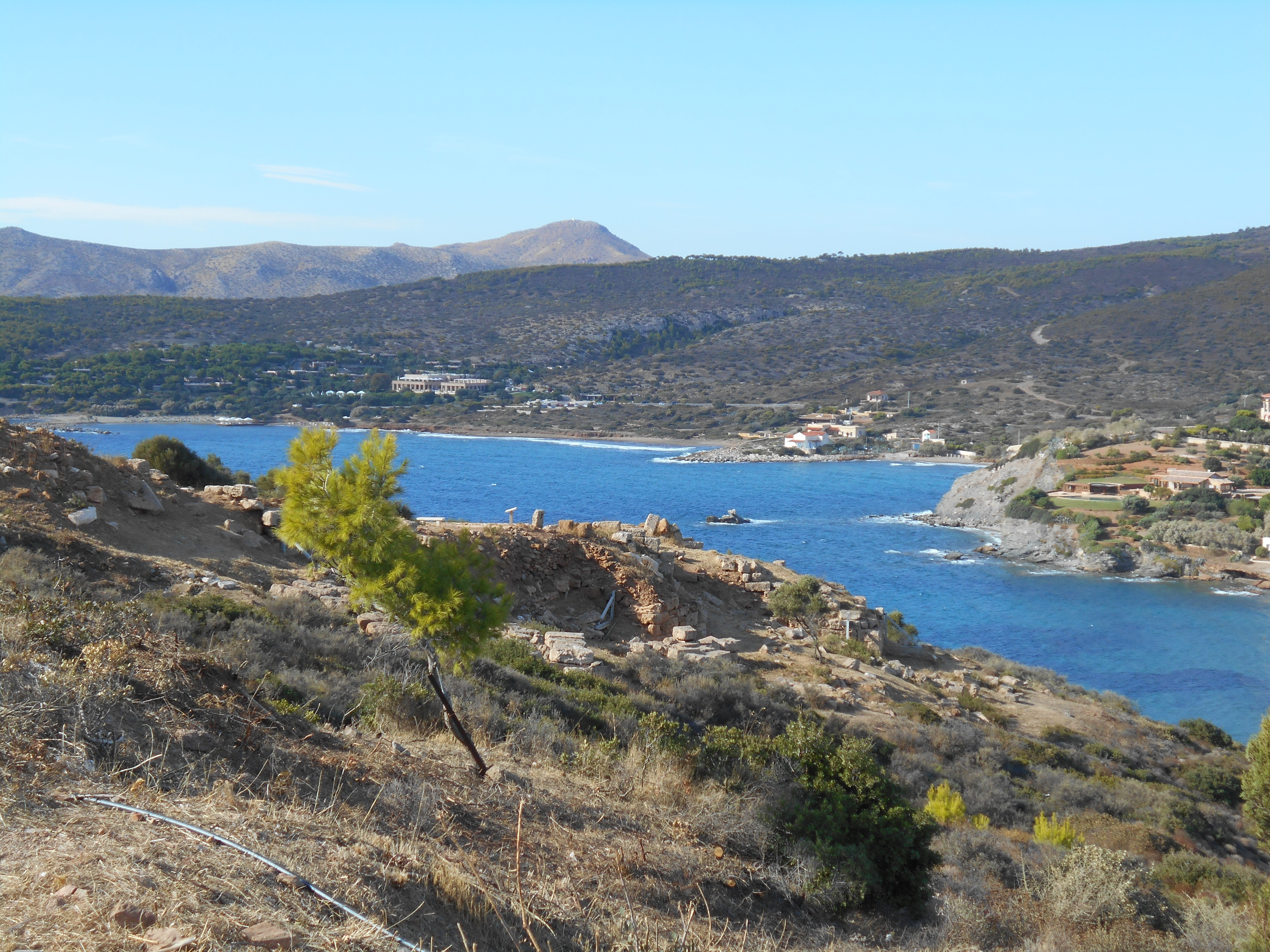 Σούνιο, αρχαιολογικός χώρος«Σούνιο, αρχαιολογικός χώρος»